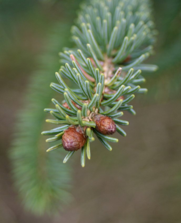 Picea glauca: Needles